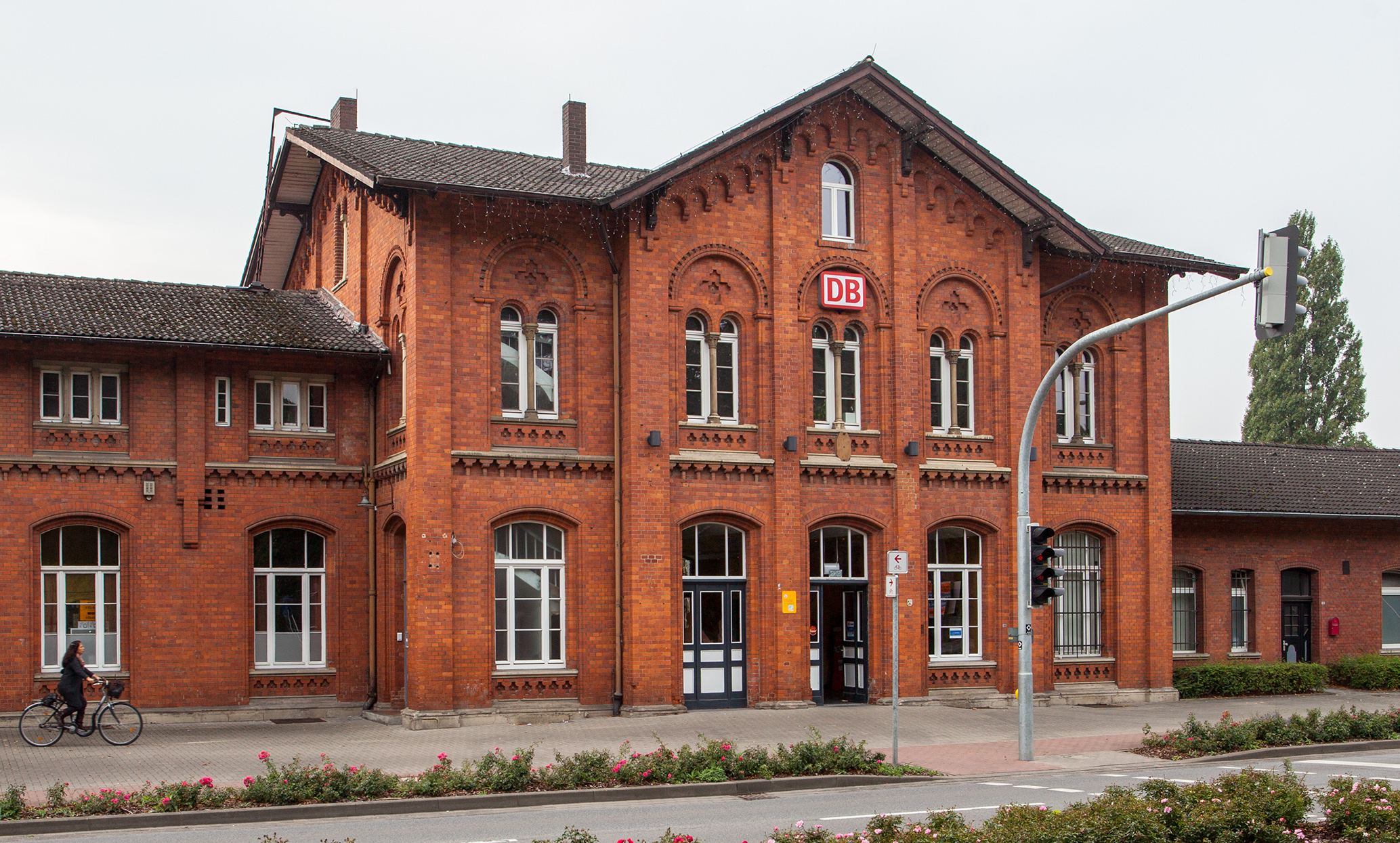 Bahnhof in Bad Salzuflen, Kreis Lippe, Nordrhein-Westfalen, Bahnhofstraße 41 This is a photograph of an architectural monument.